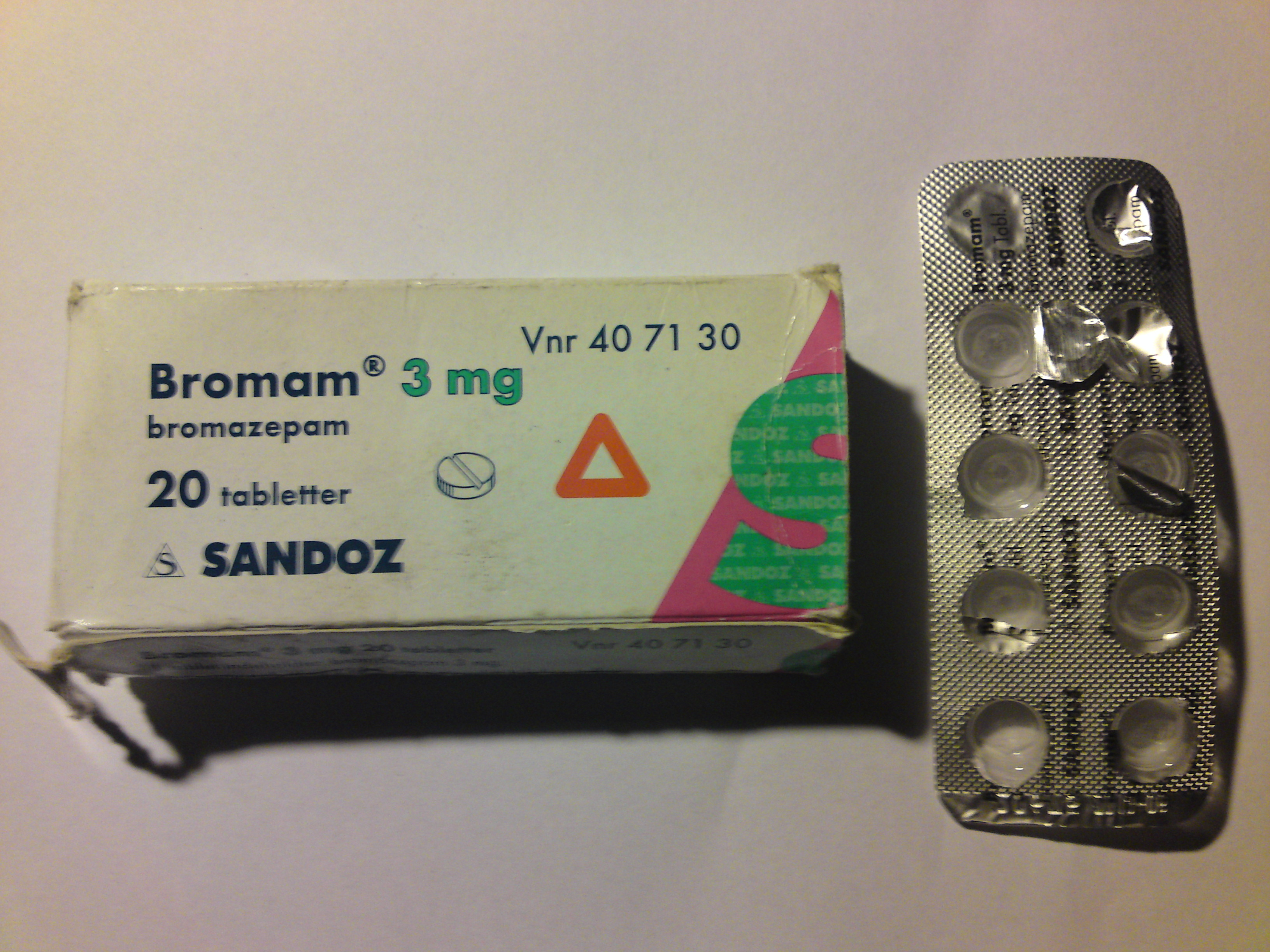 Billede af Bromam 3 mg. Bromazepam